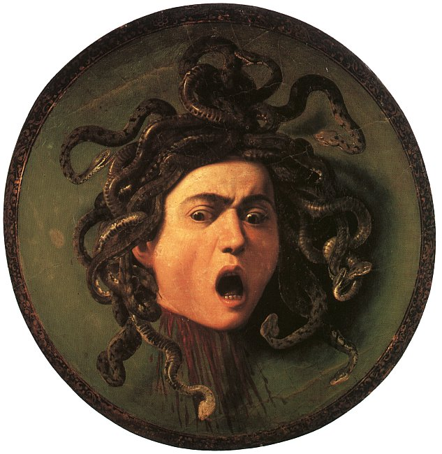 Medusa